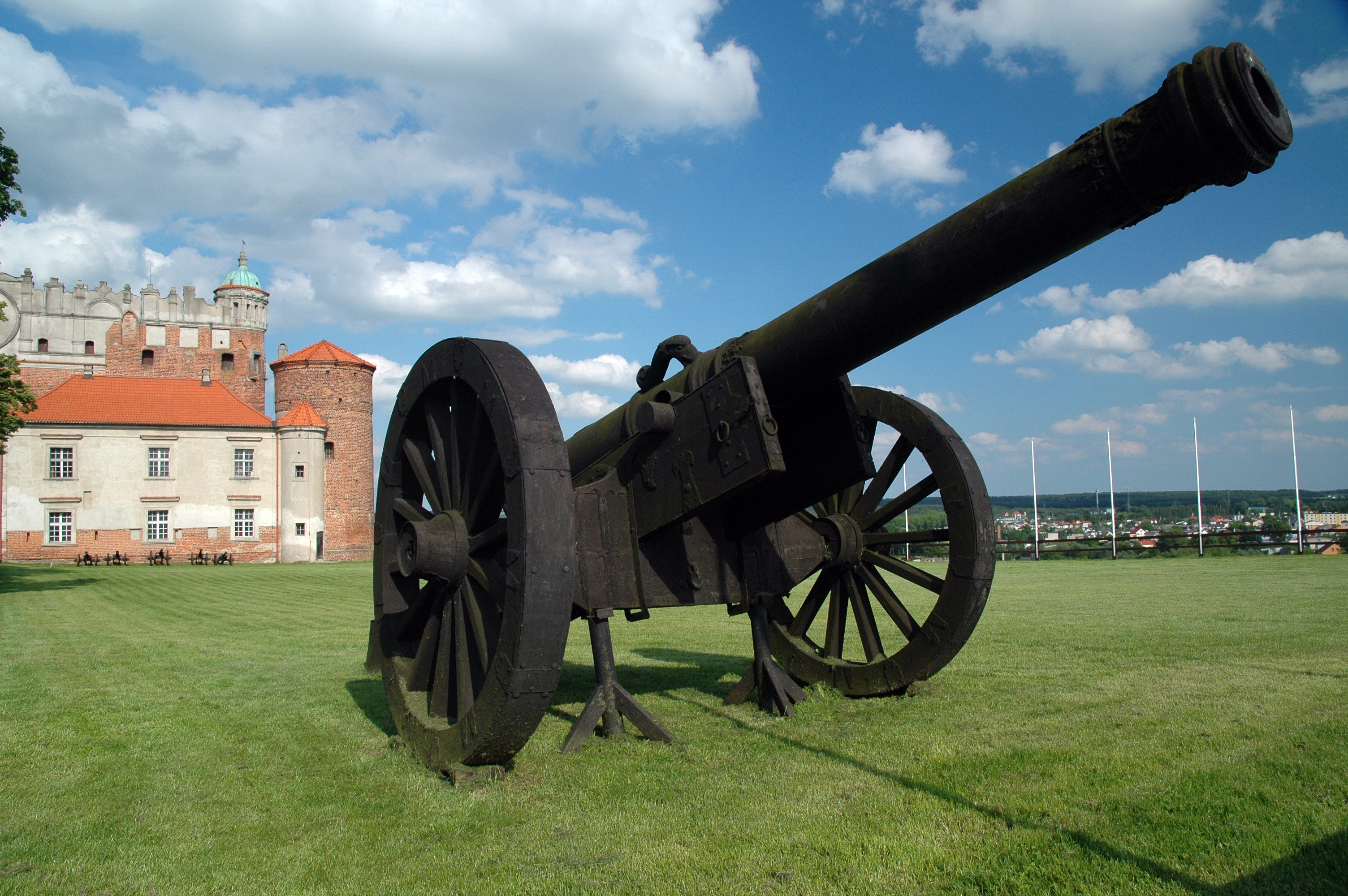 Golub-Dobrzyń - Kmicicowa kolubryna